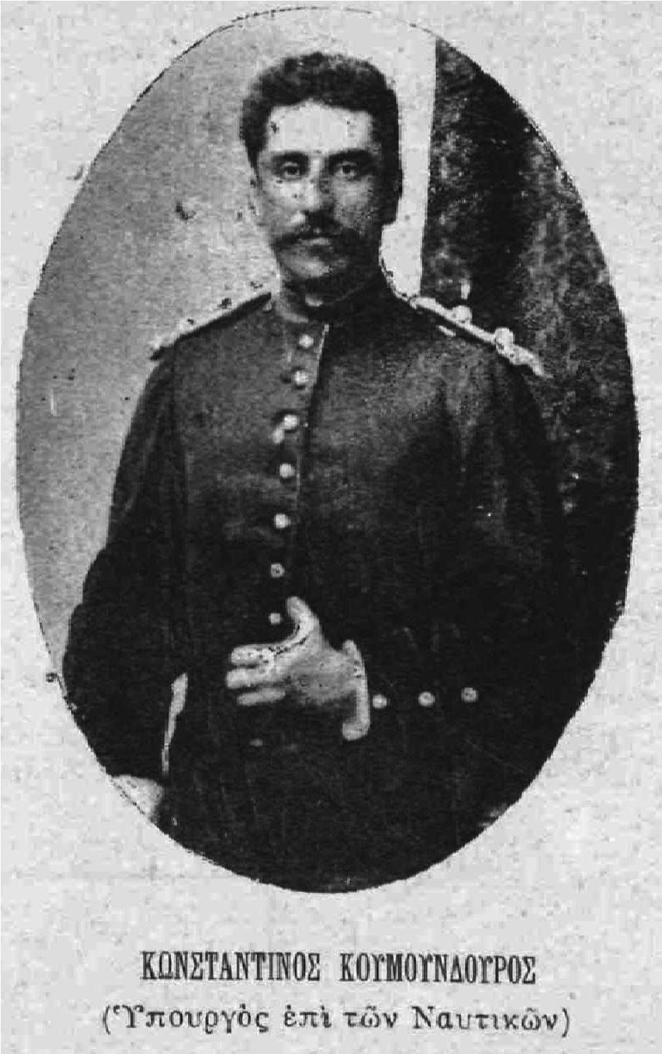 griechischer Politiker, 19. Jahrhundert